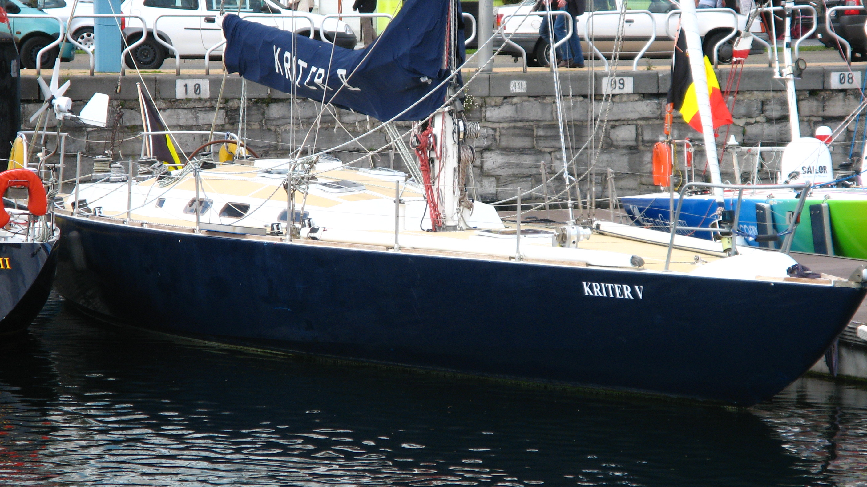 Kriter V dans le port de Oostende